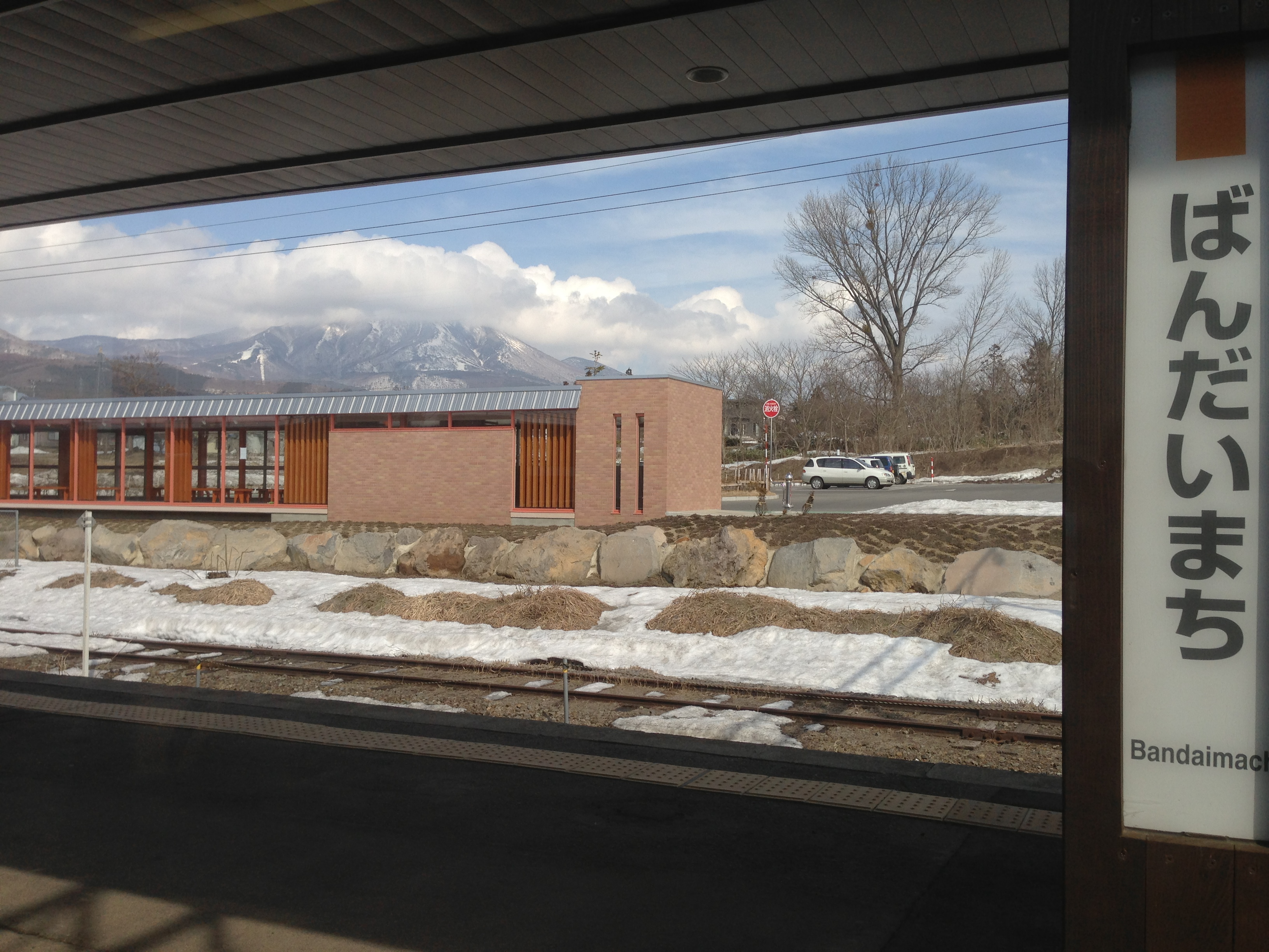 JR磐越西線 磐梯町駅ホームから